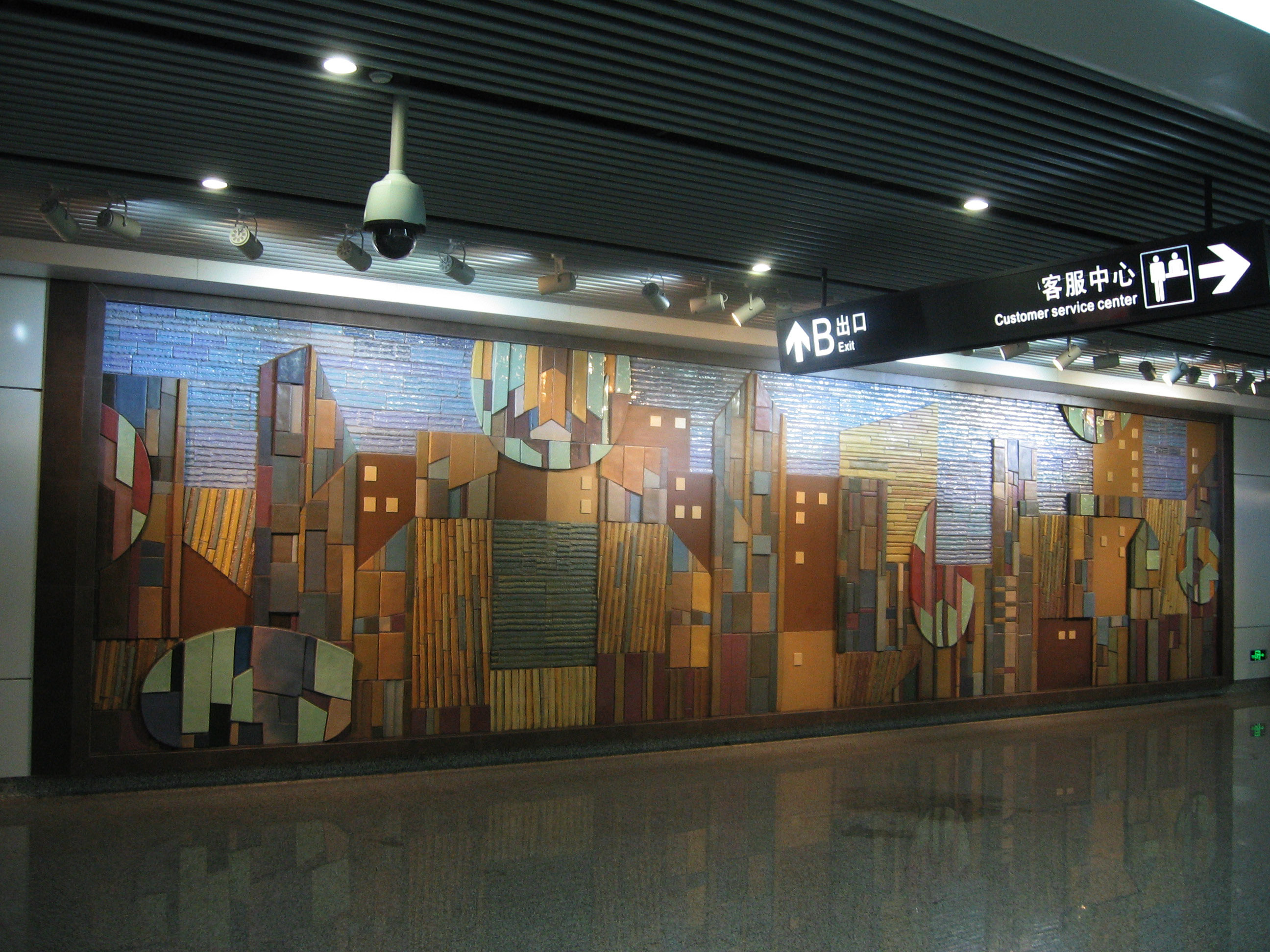 福庆北路站文化墙《璀璨新城》